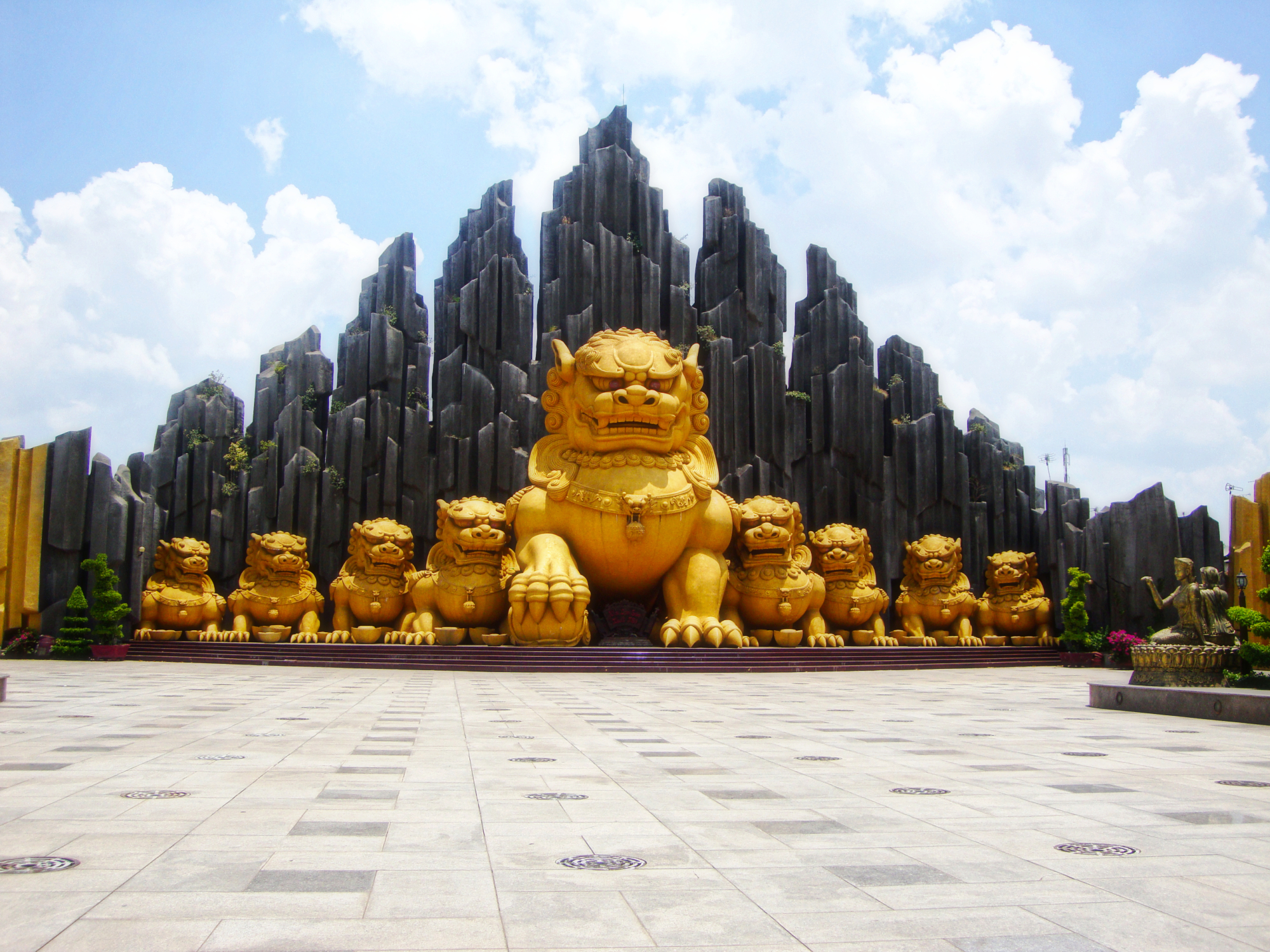 KDLVH Suối Tiên